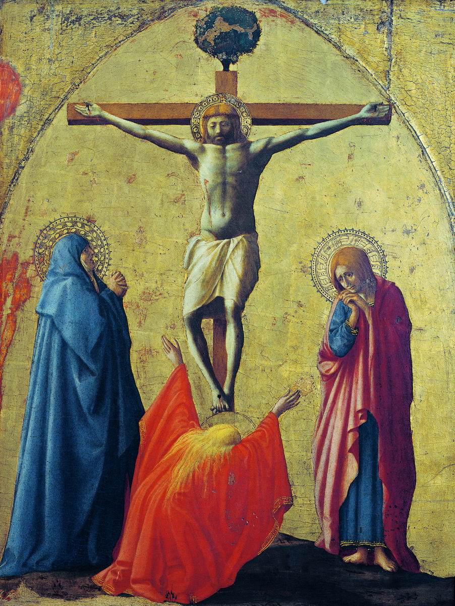 Kreuzigung Christi. Tafel des ehemaligen Polyptychons von Santa Maria del Carmine in Pisa, Blattgold und Öl auf Holz, 77 x 64 cm (Neapel, Museo Nazionale di Capodimonte)